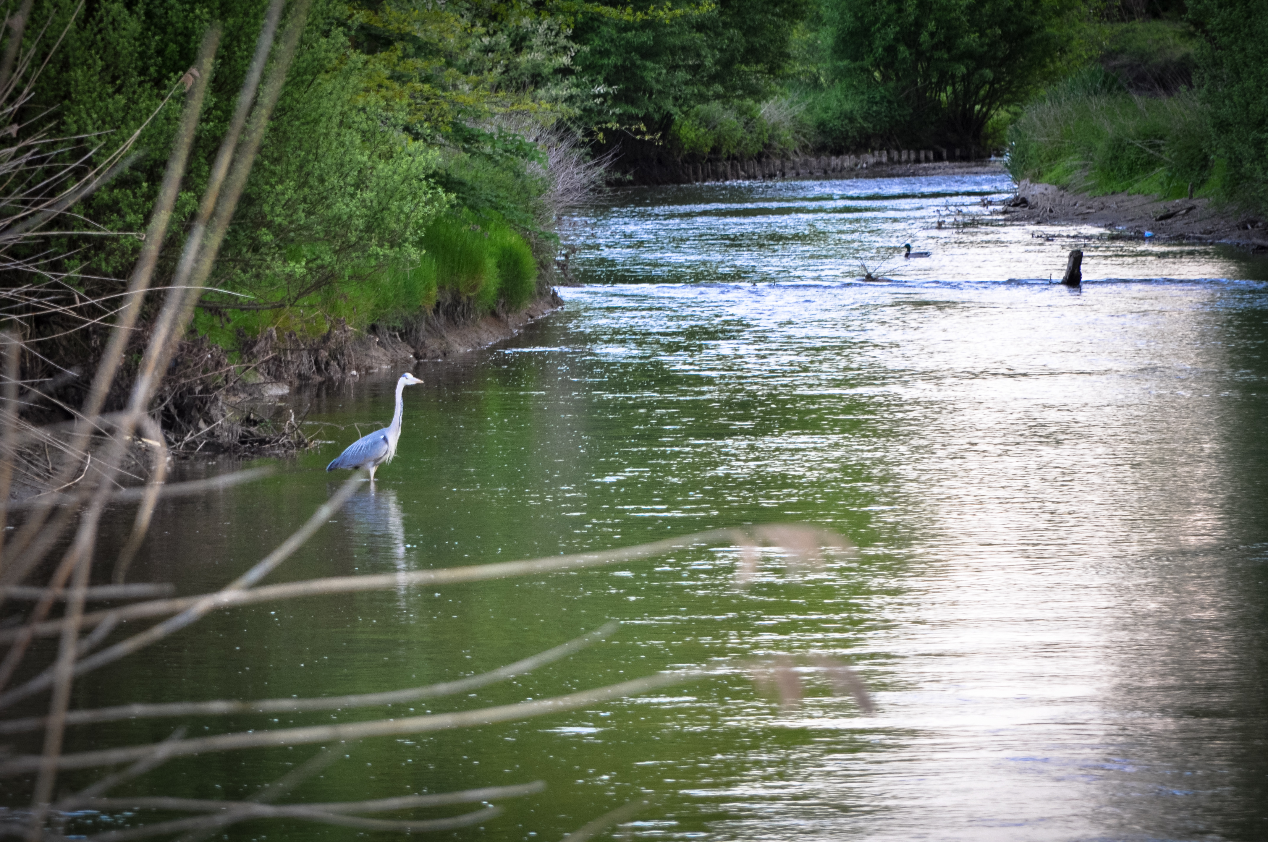 Bord de l'Orge